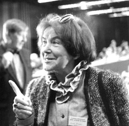 ADN-ZB Senft 14.7.87 Berlin: Internationales Schriftstellergespräch "Berlin - ein Ort für den Frieden" im Mai 1987 - Unter den Teilnehmern waren Hermann Kant, Präsident des Schriftstellerverbandes der DDR, und die BRD-Autorin Luise Rinser.